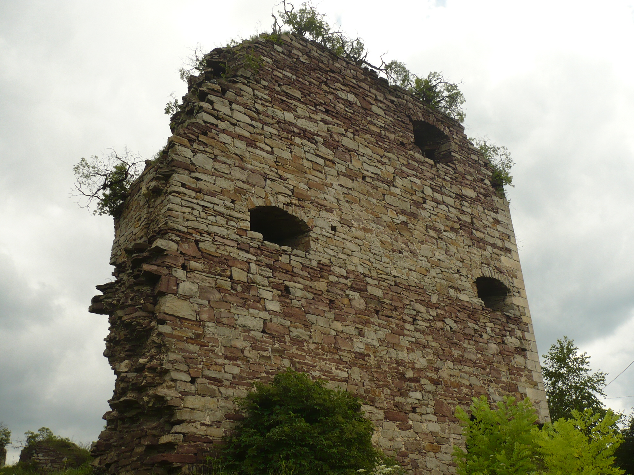 Buczacz. Zamek